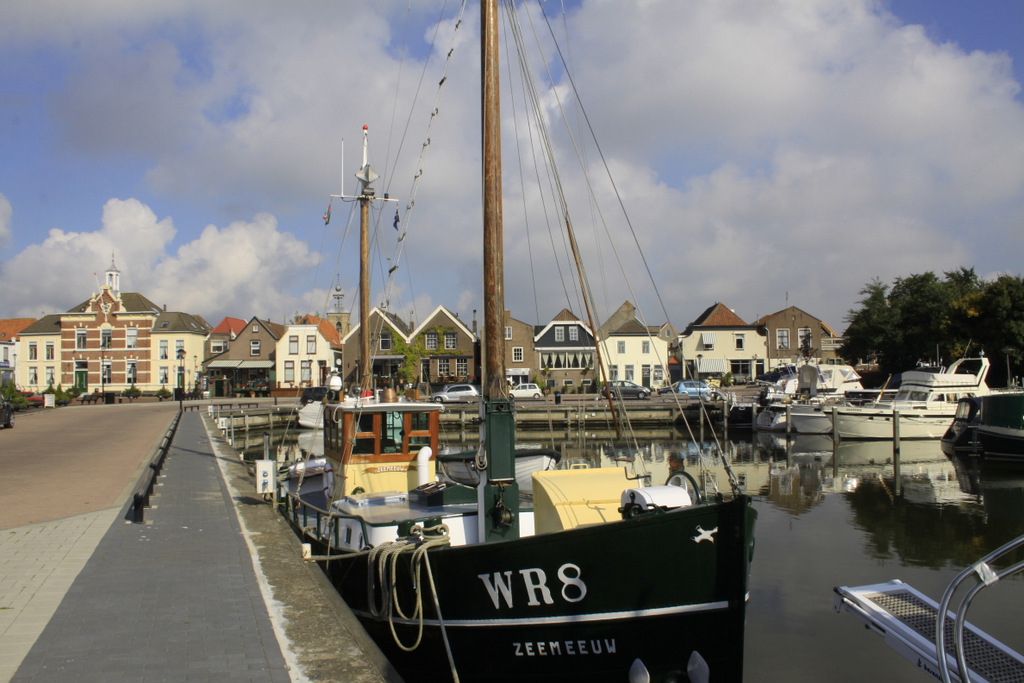 Dorp en havengezicht van Oude-Tonge gezien vanaf de Kaai.